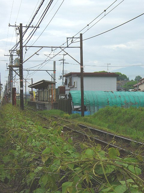 和歌山電鐵 西山口駅 駅舎